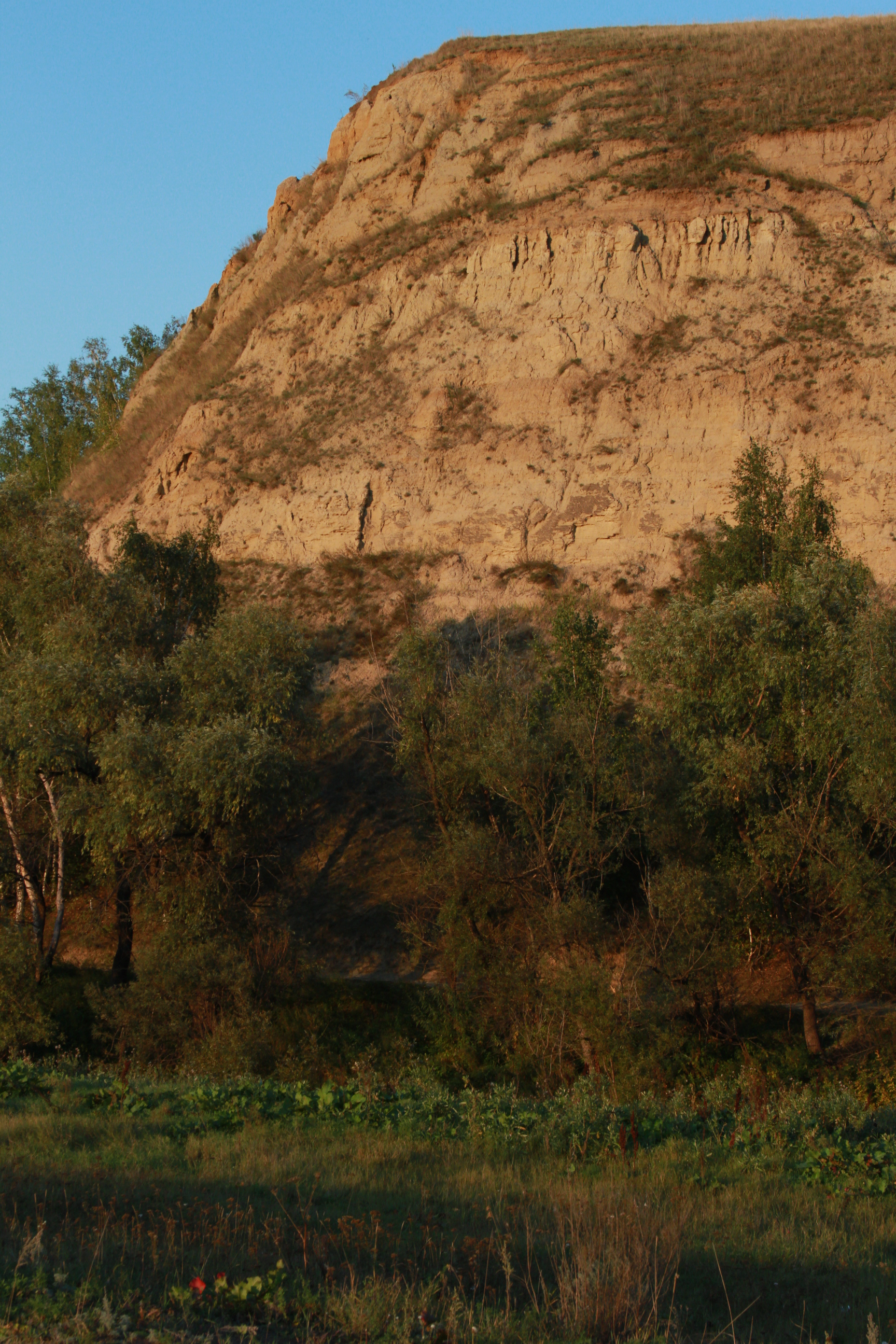 Обнажение Бещаул